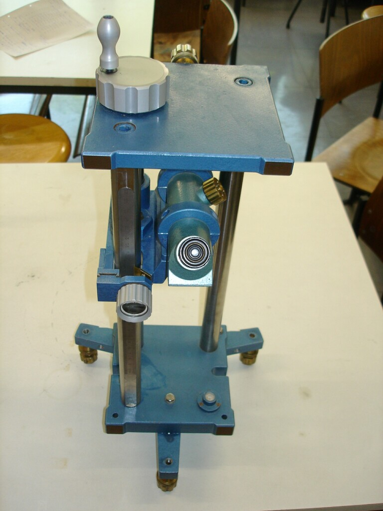 Fotographie eines Kathetometers aus der leichten Vogelperspektive im Praktikumsraum